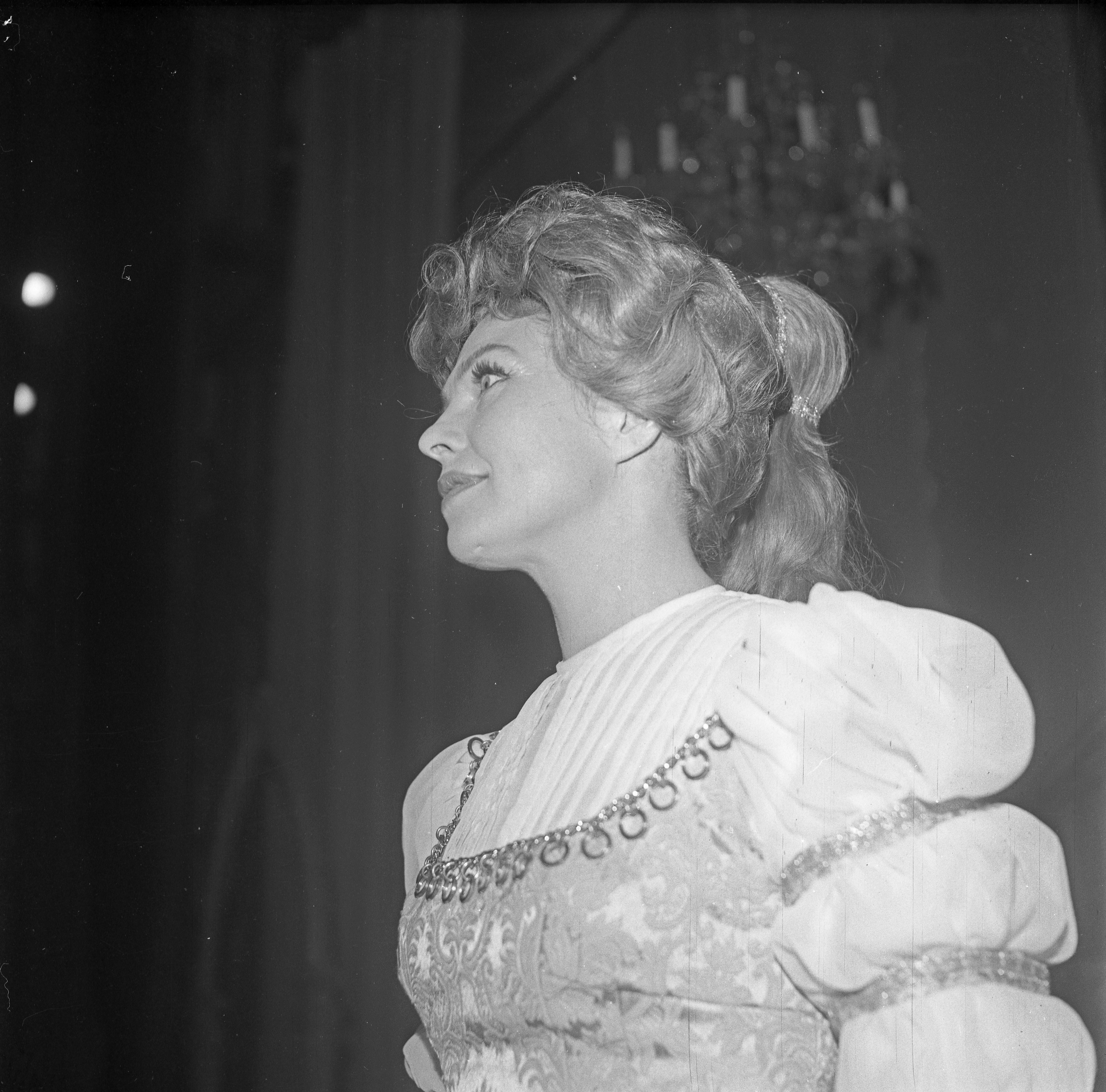 Den norska skådespelerskan Eva Bergh som Portia i Shakespeares Köpmannen i Venedig i Bergen.